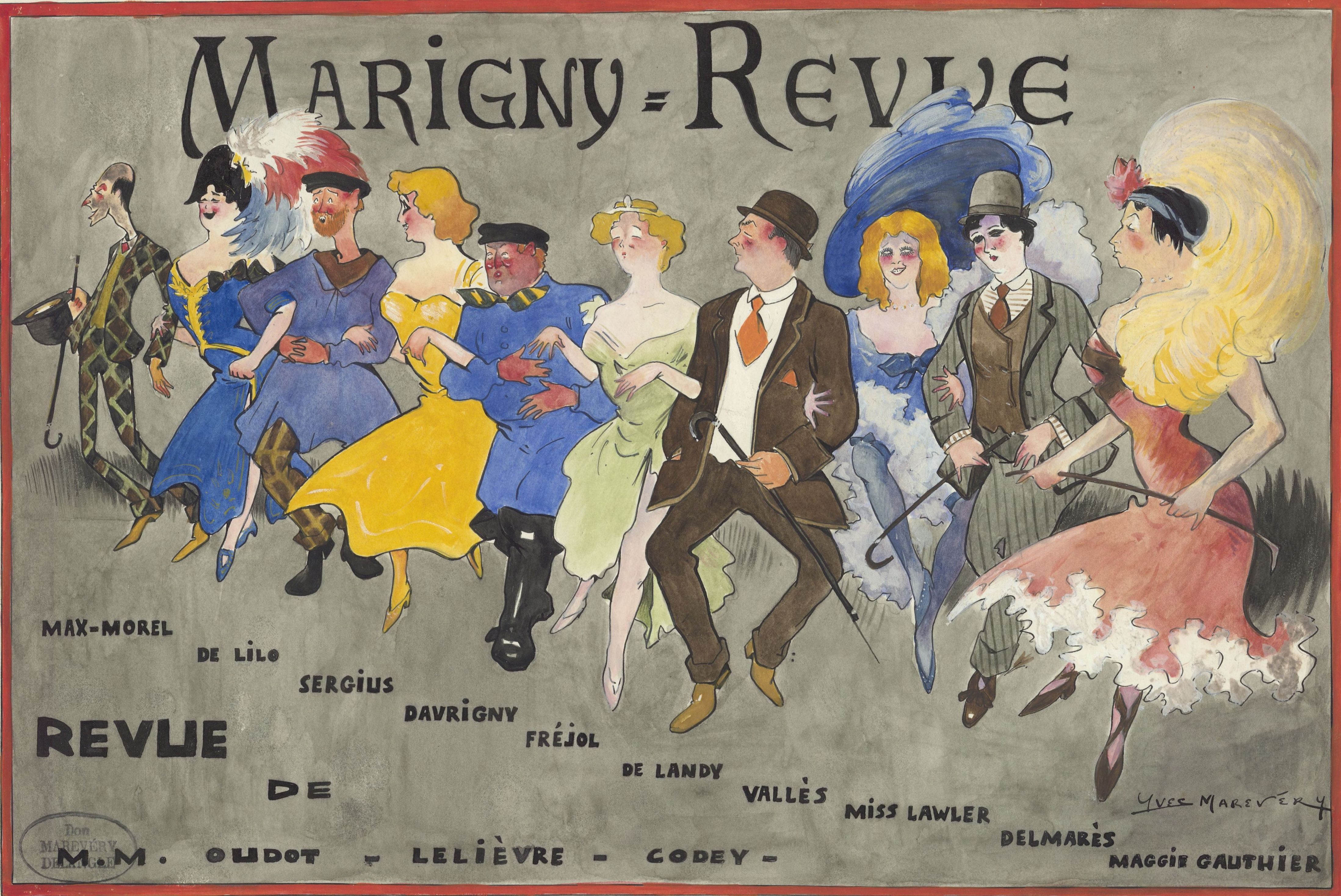 "La revue de Marigny" de Jules Oudot, Léo Lelièvre et Emile Codey / dessin de Yves Marevéry